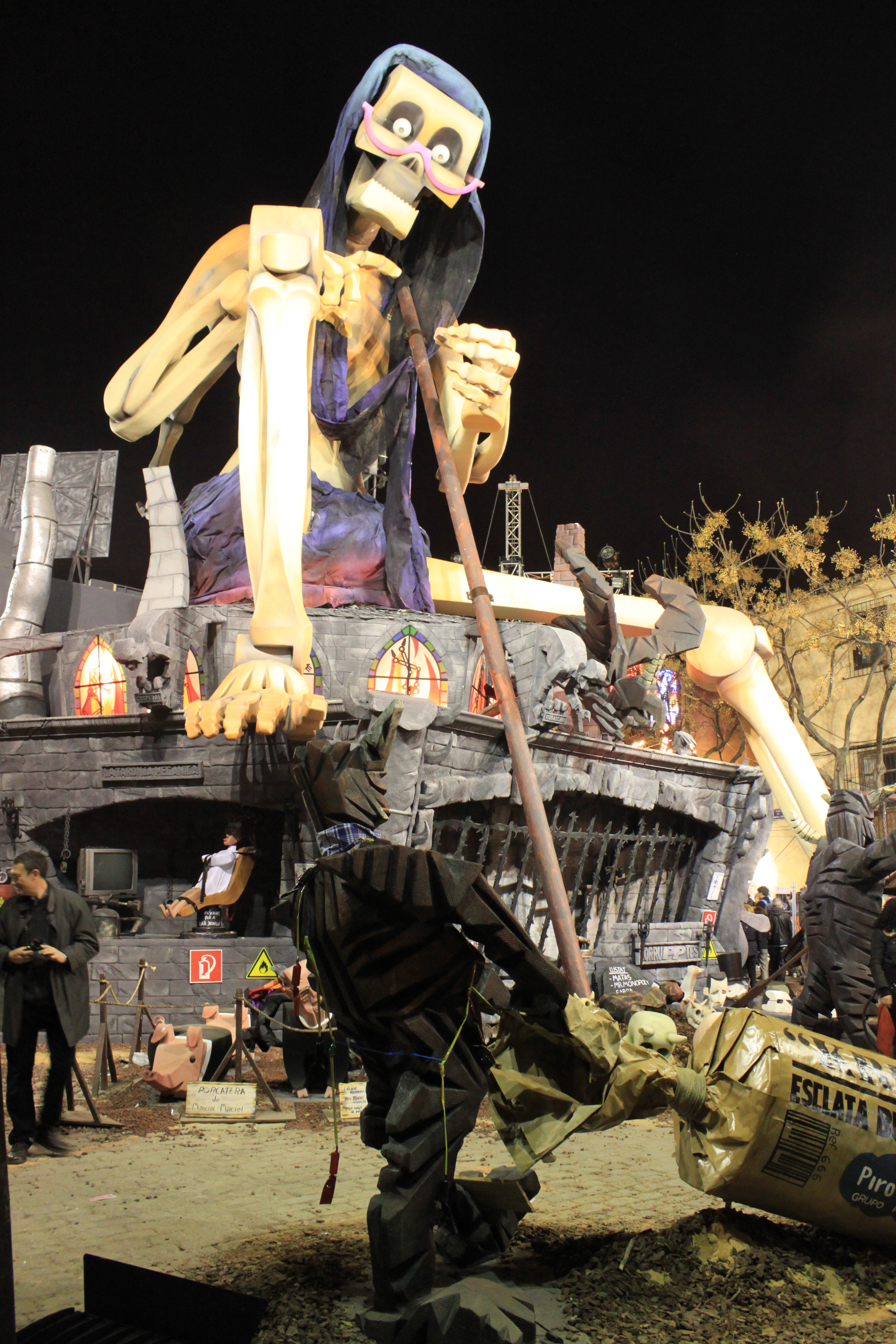 Fallas 2011 Valencia, falla Na Jordana